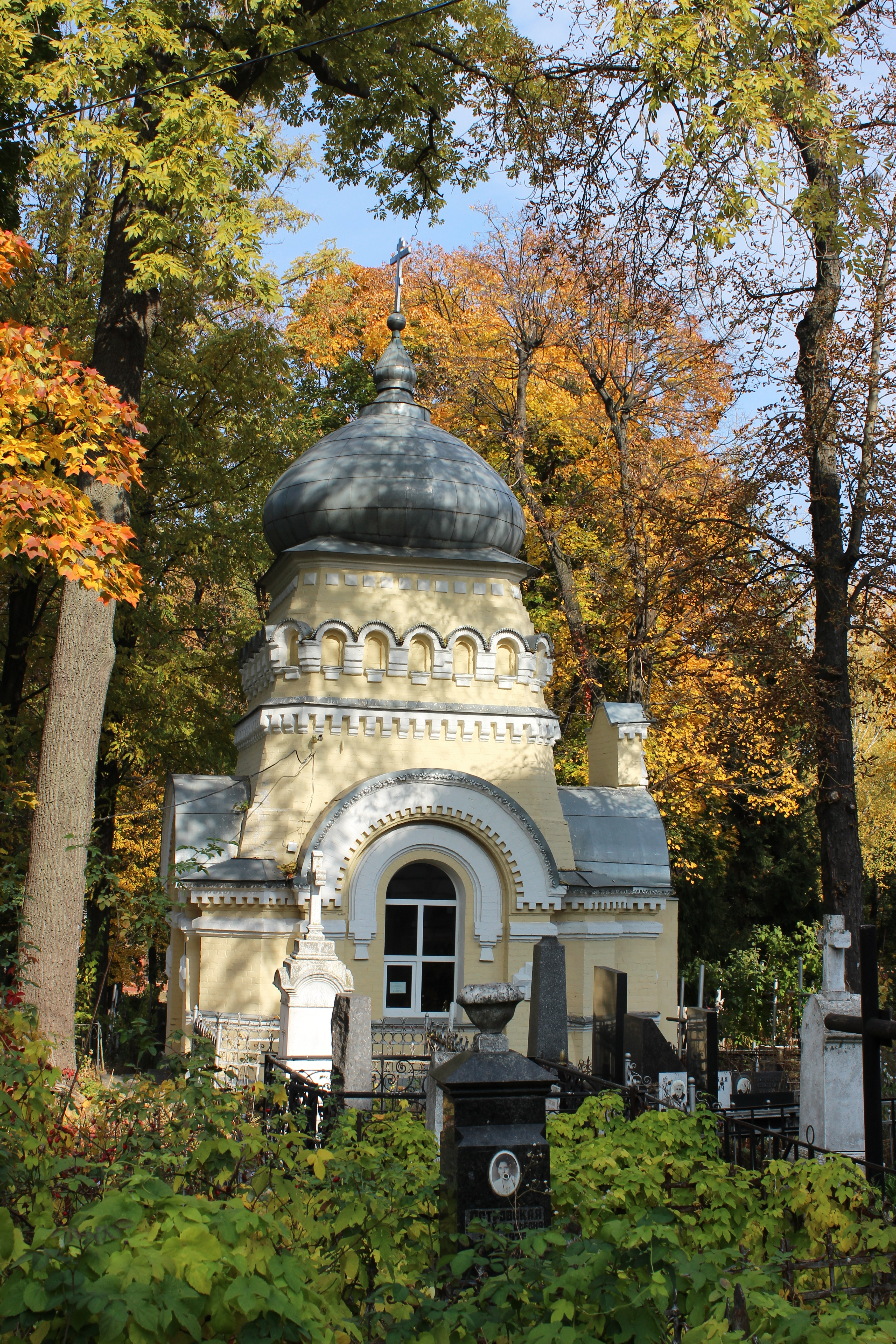 Родинний склеп Сольських, де поховано Сольського С. М., голову Київської міської думи, літератора, педагога, громадського діяча та Маркевича Є. Д., професора, Київ, Дорогожицька вул., 7